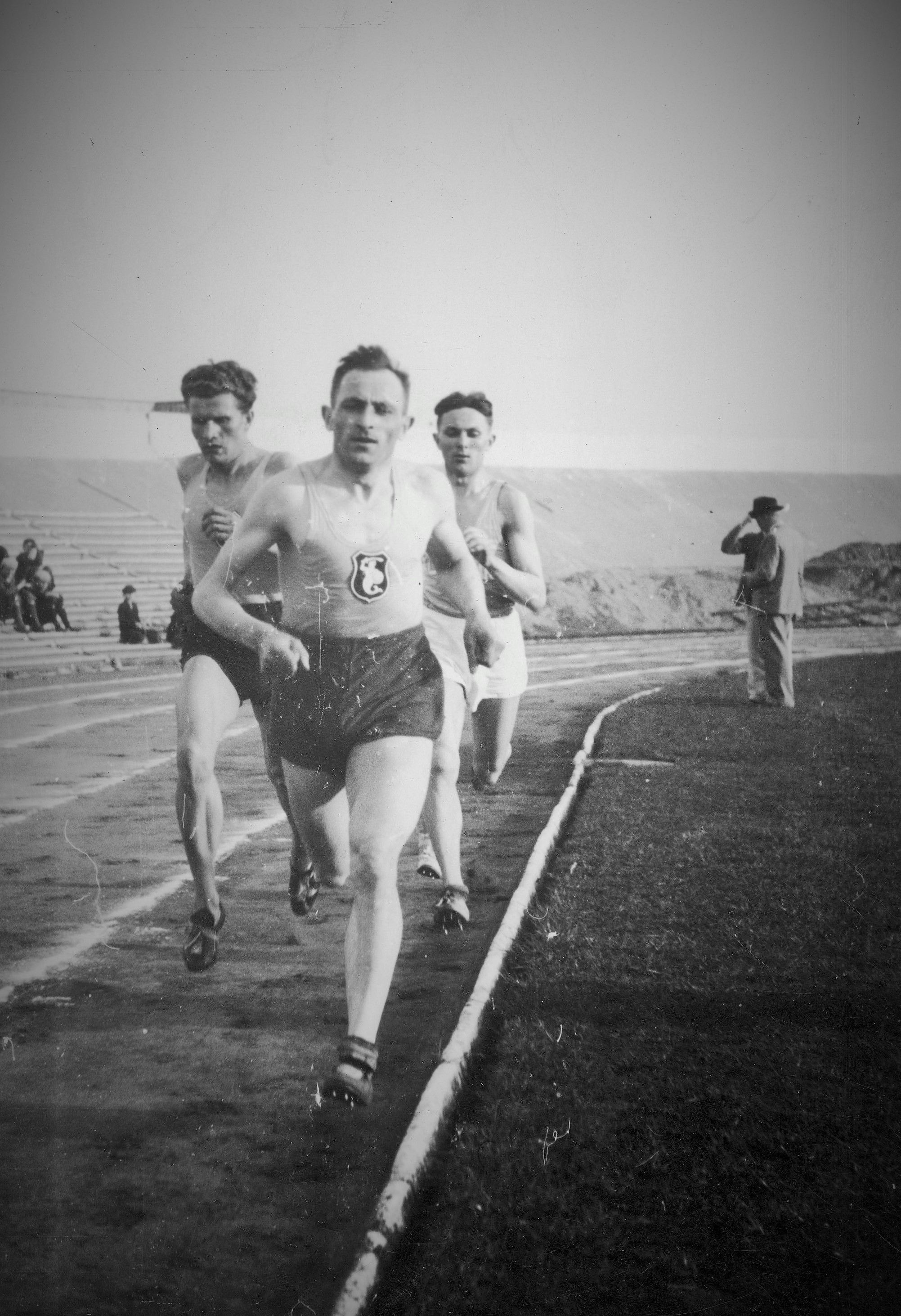 Mecz lekkoatletyczny Warszawa - Poznań w Warszawie 1938. Bieg na 1500 metrów. Prowadzi Józef Noji (w barwach klubu Syrena Warszawa) przed Janem Staniszewskim.